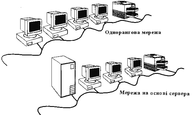 Однорангова мережа і мережа на основі сервера